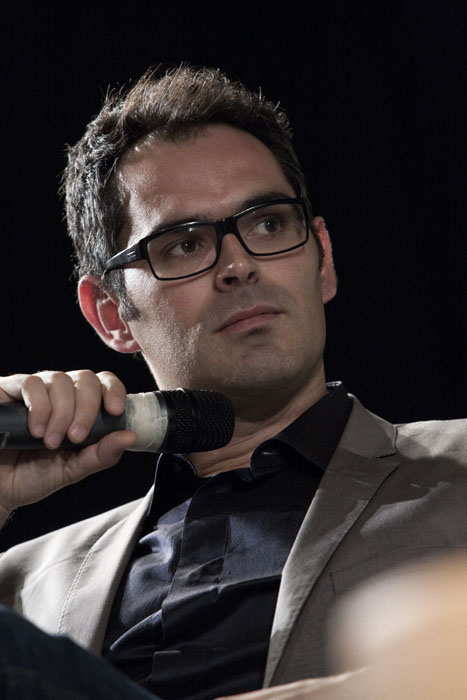 Luca Ragazzi Foto di Elisa Caldana / Cinemazero